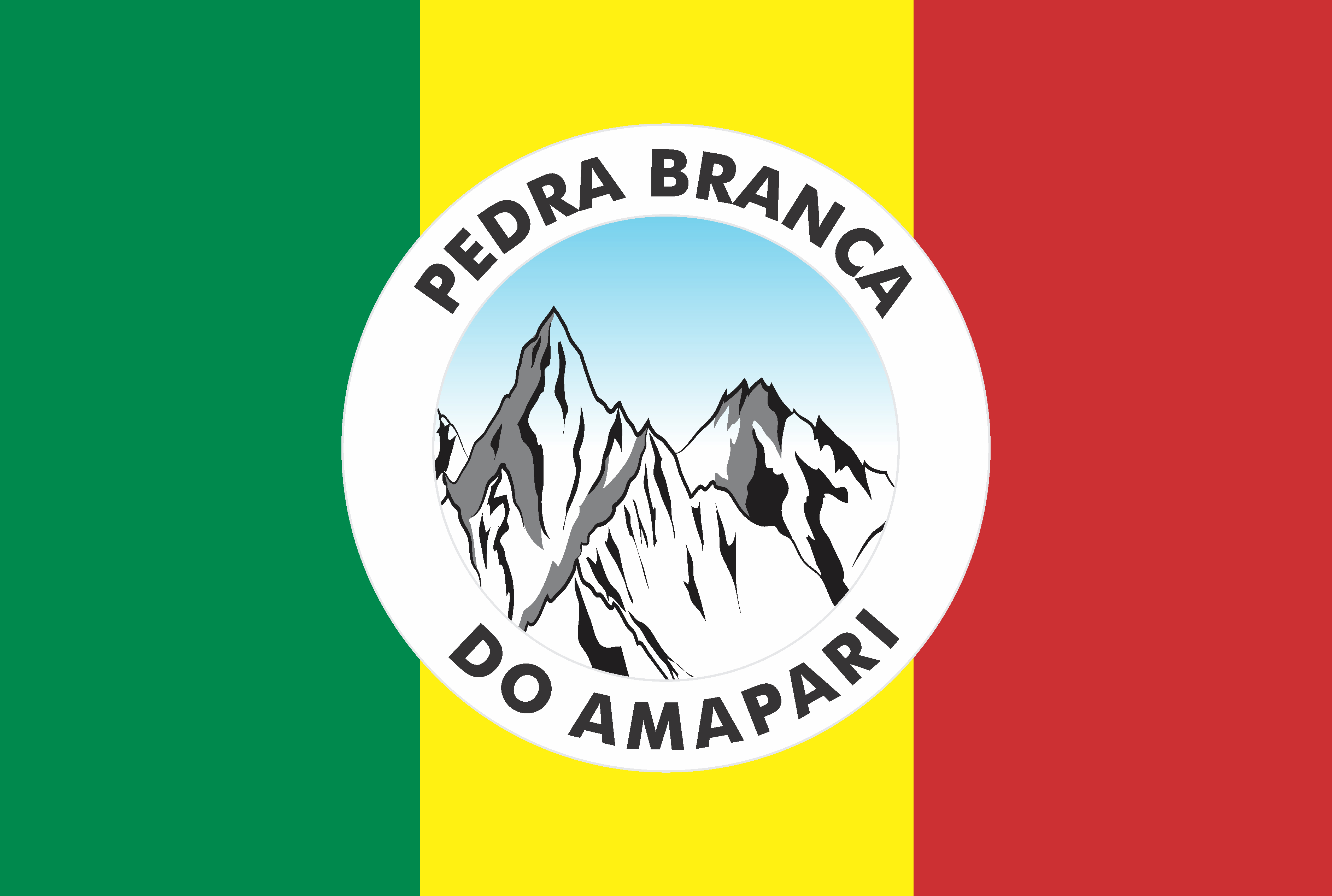 A bandeira possui uma pedra ao centro, pedra que deu nome ao municipio